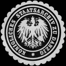 Sealing stamp Title: Königliches Staatsarchiv zu Danzig Description: schwarz, weiß, geprägt Place: Danzig size: 4 cm